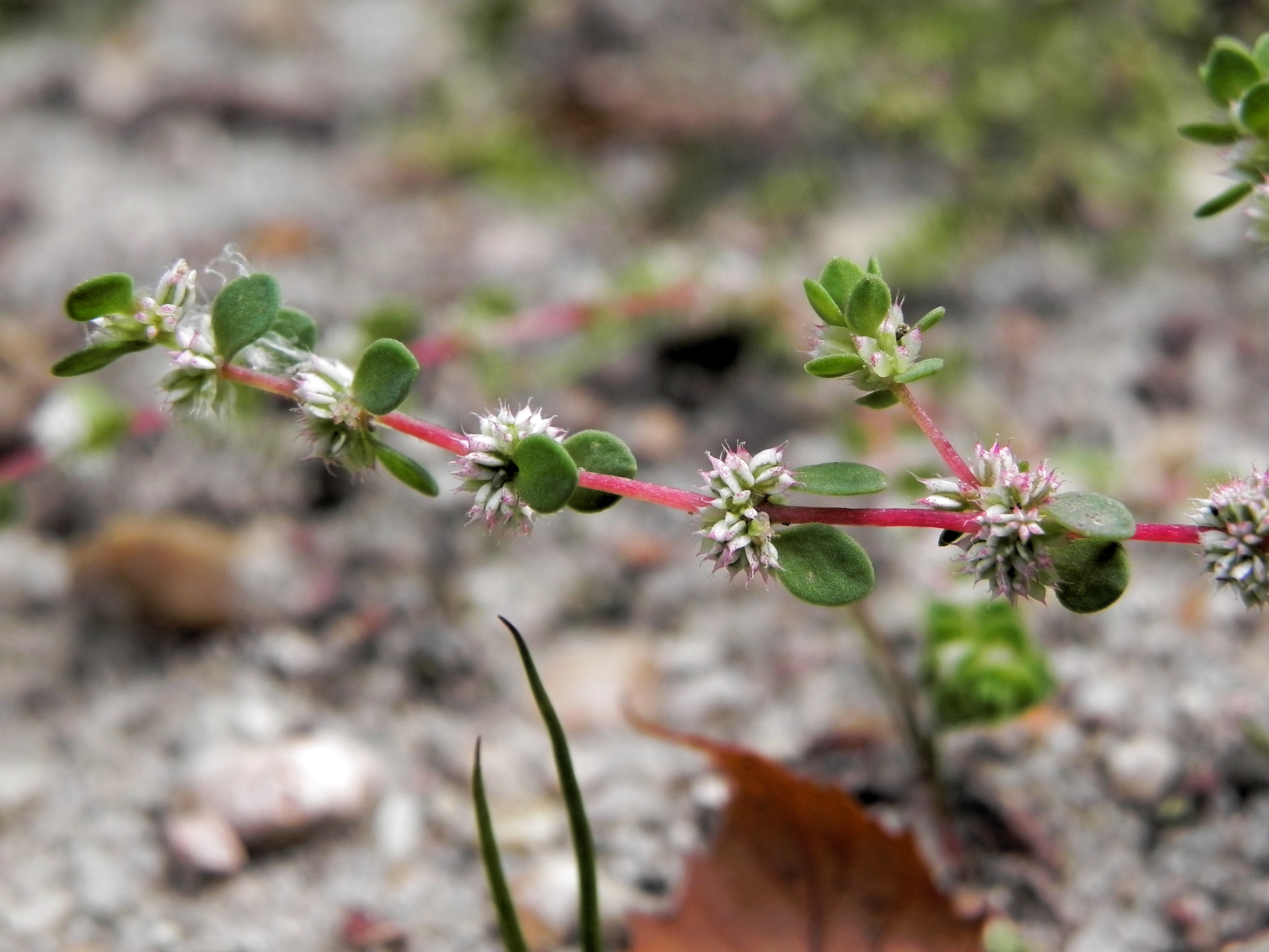 Quirlige Knorpelmiere (Illecebrum verticillatum) Südheide (Germany)